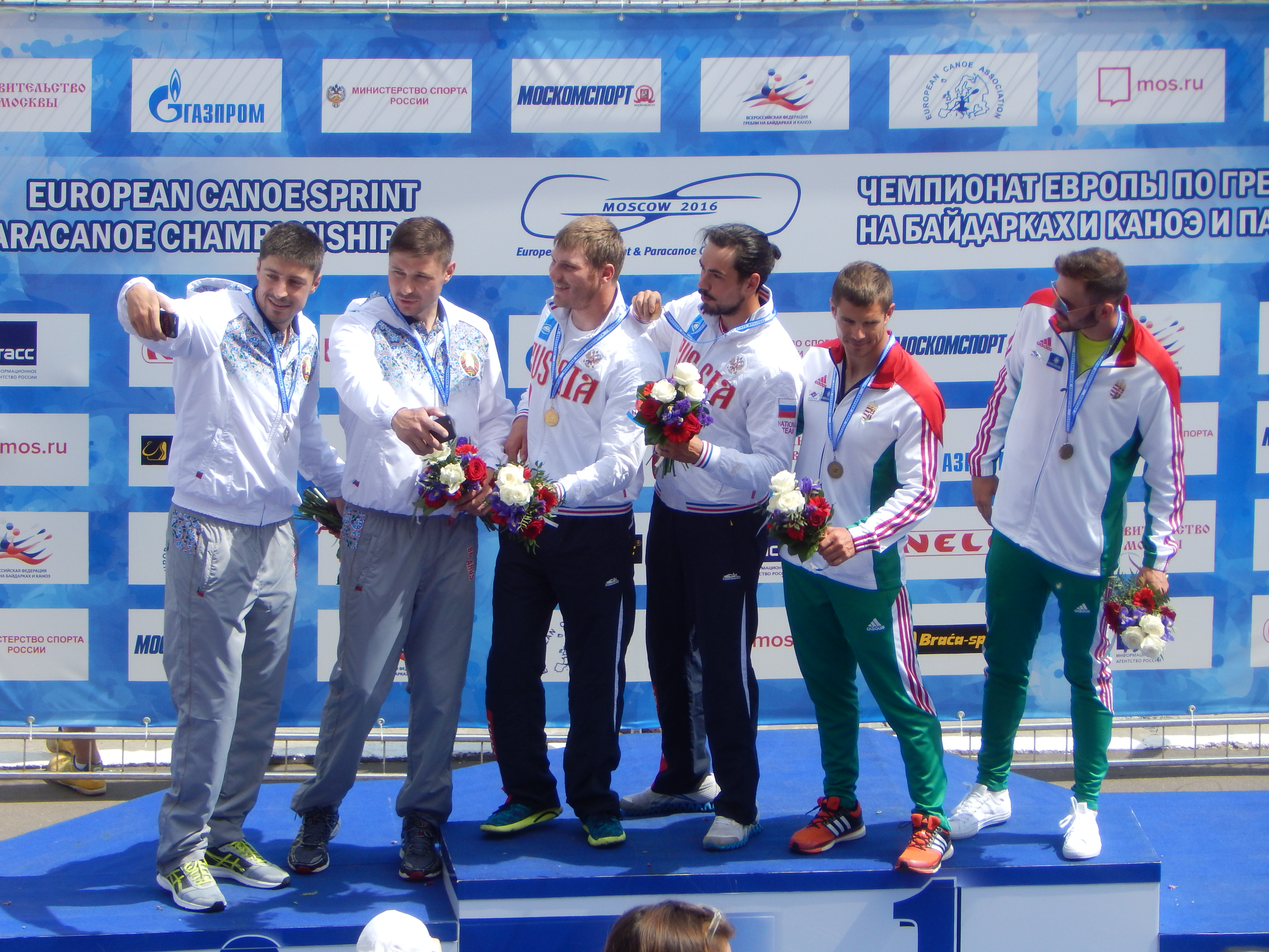 Церемония награждение мужчин в каноэ-двойке 1000 м